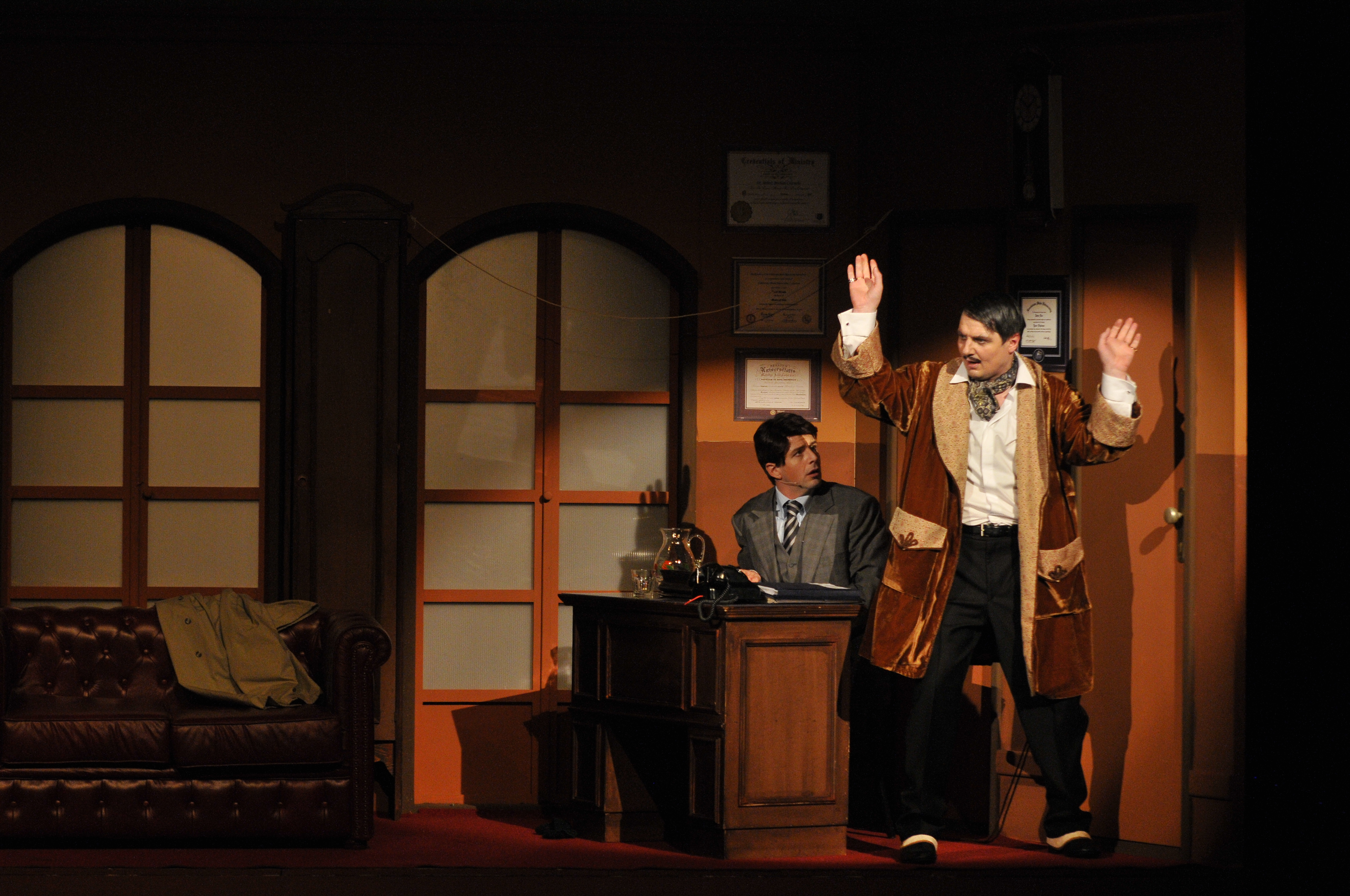 Premijera predstave "Producenti"